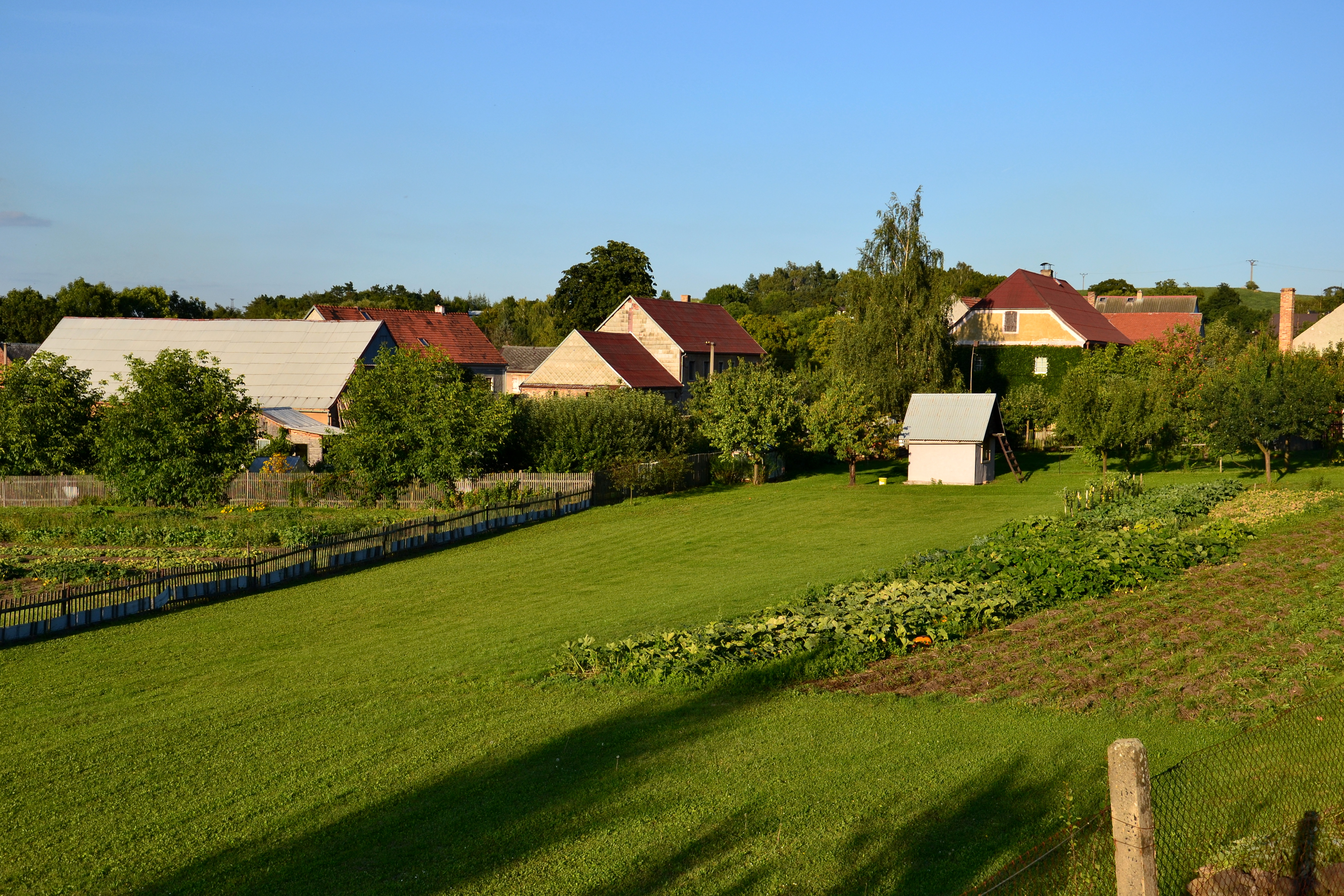 Domy na západním okraji vesnice